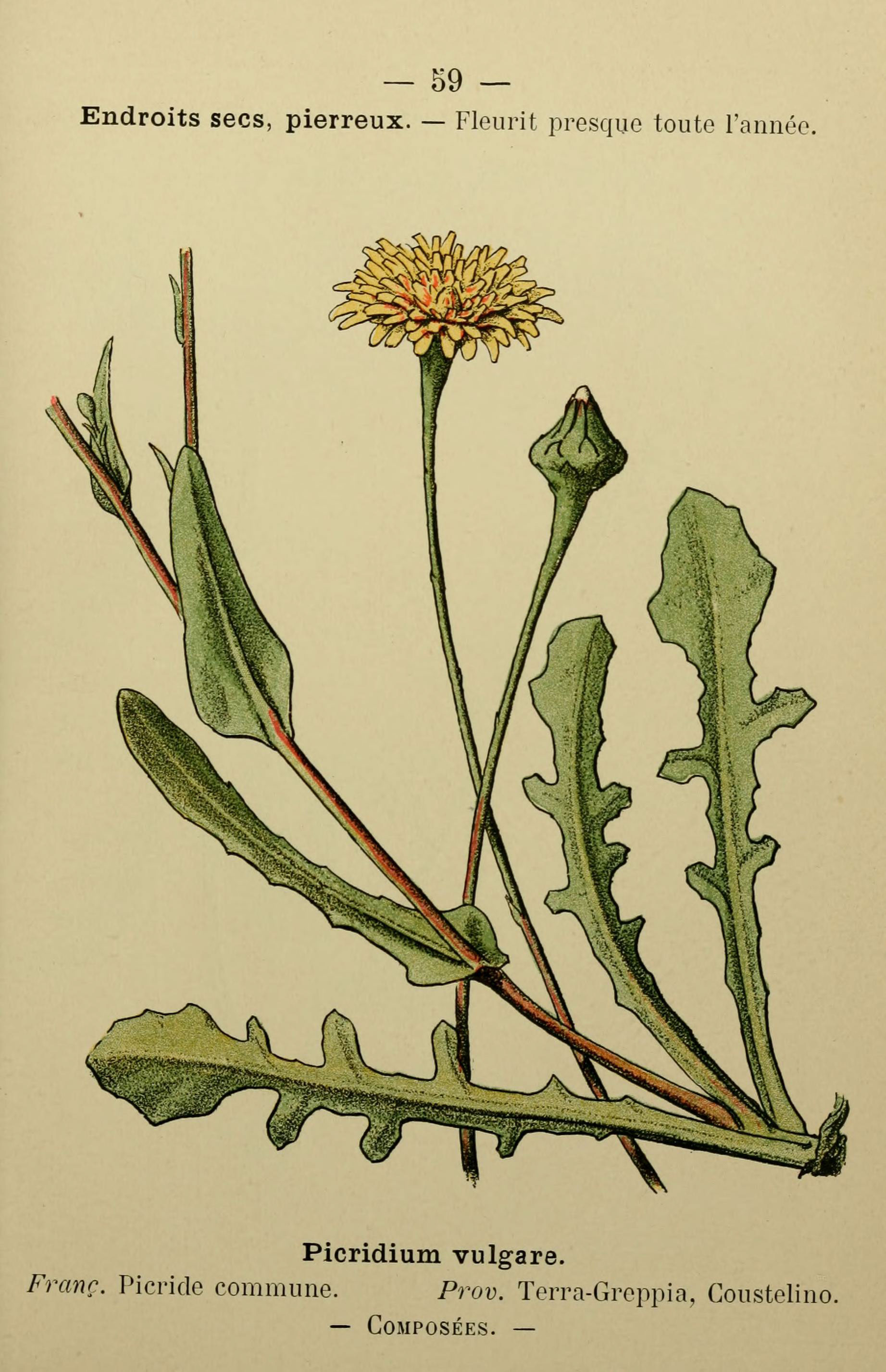 — 59 — Endroits secs, pierreux. — FlGurit presque toute l'année. Picridium vulgare. Franc. Picride commune. Prov. Terra-Greppia, Goustelino. — Composées. —